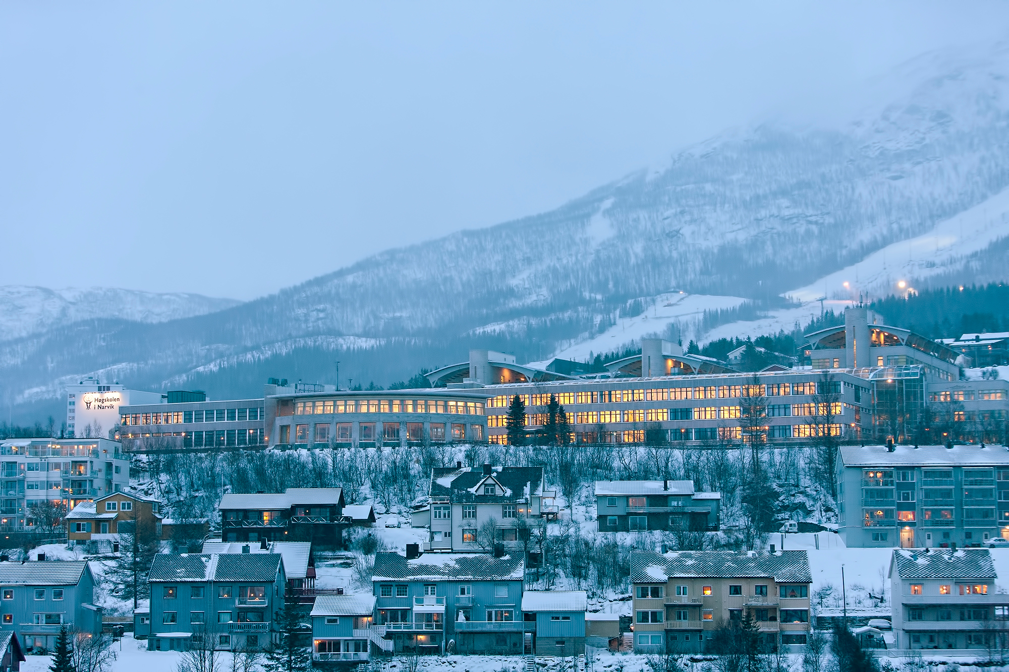 UiT - Norges arktiske universitet, campus Narvik, huser blant annet Fakultet for ingeniørvitenskap og teknologi (IVT-fakultetet)